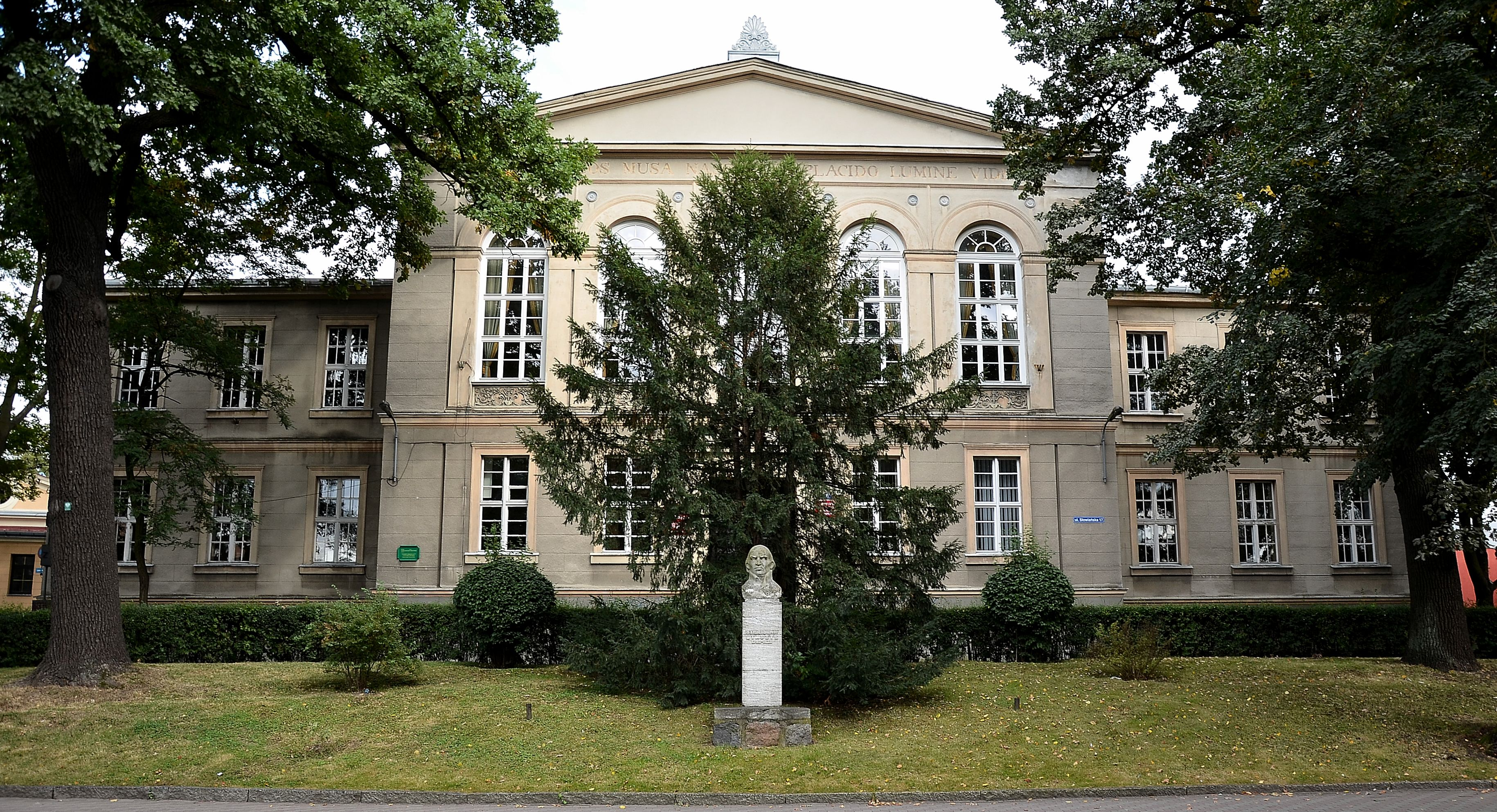 Kwidzyn, ul. Słowiańska 17 - dawniej pałac, później gimnazjum F. Schillera, obecnie zespół szkół, 1835-1838